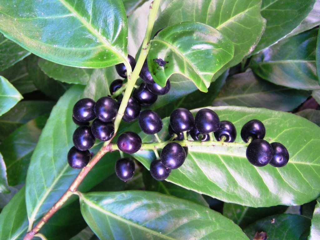 Großblättrige Lorbeerkirschen